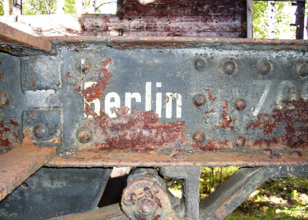 Einer der vielen Waggon ist ursprünglich aus Berlin: Ob Kriegsbeute oder Reparationsleistungen, jedenfalls musste dieser Waggon auf die russische Normalspur umgebaut werden.